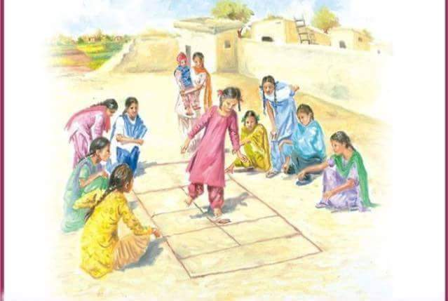 لڑکیاں شیڈن کھیل کھیل رہی ہیں